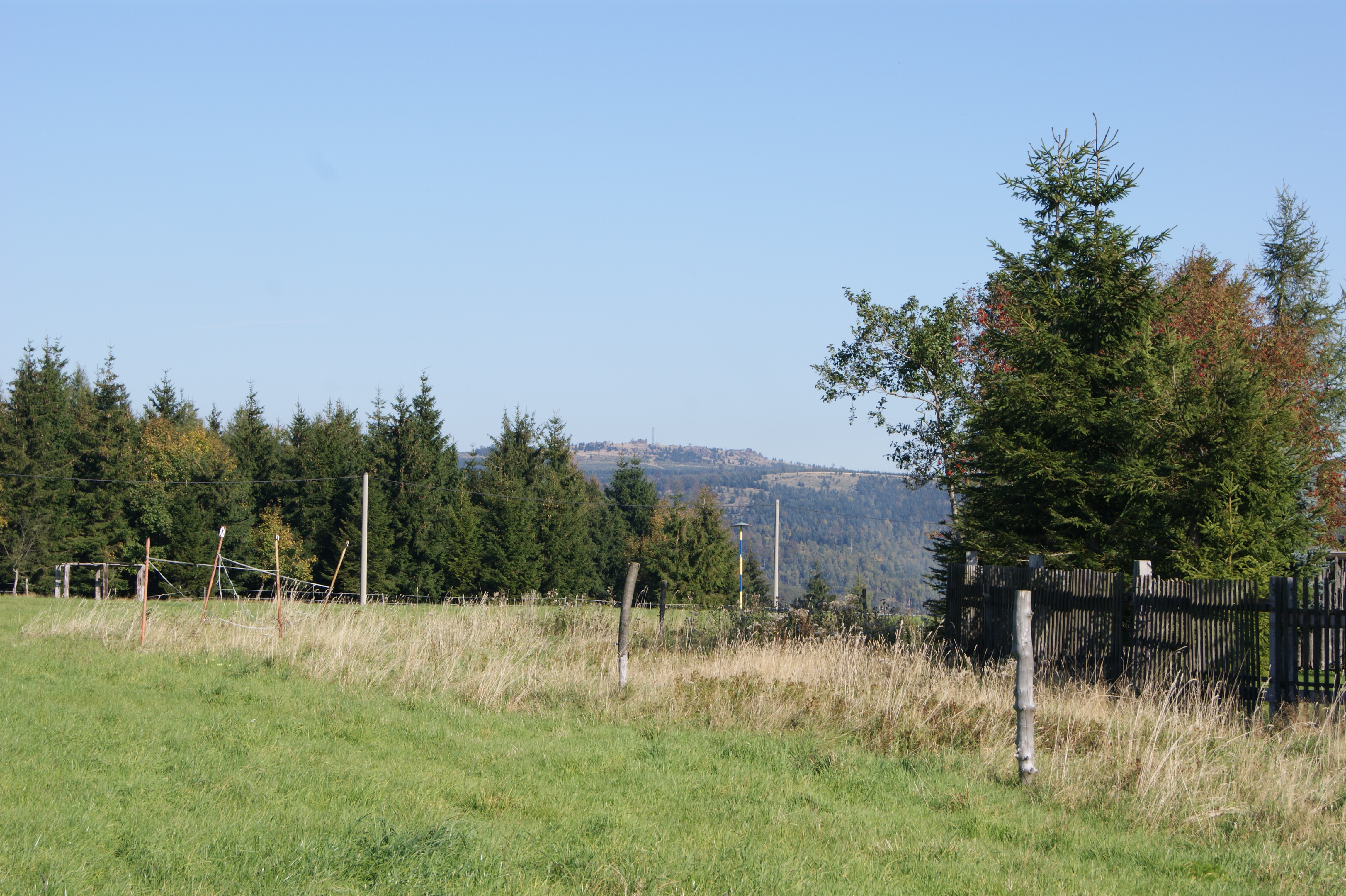 Loučná (Wieselstein) von Klíny (Göhren) gesehen